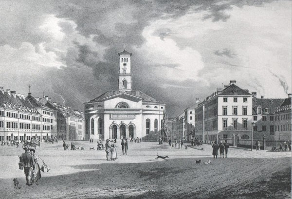 Evangelische Matthäus-Kirche in München um 1830. Reproduktion einer Lithographie von Karl August Lebschée (1800-1877). Die 1827-1833 erbaute, älteste evangelische Kirche Münchens wurde 1938 auf Betreiben der Nationalsozialisten abgebrochen. (Bayerische Staatsbibliothek, Porträt- und Ansichtensammlung)